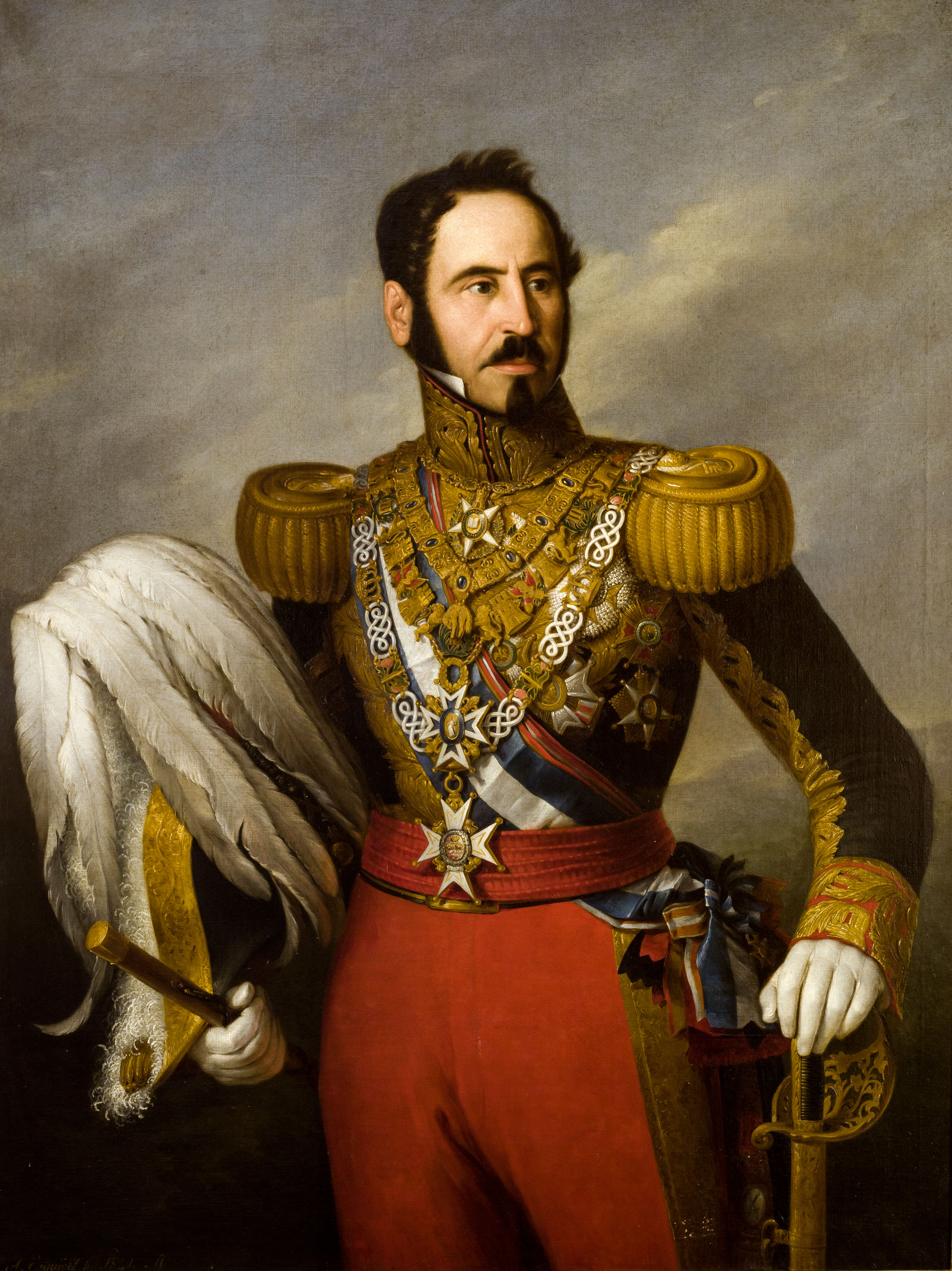 Retrato del general español Baldomero Espartero (1793-1879), príncipe de Vergara y regente de España.